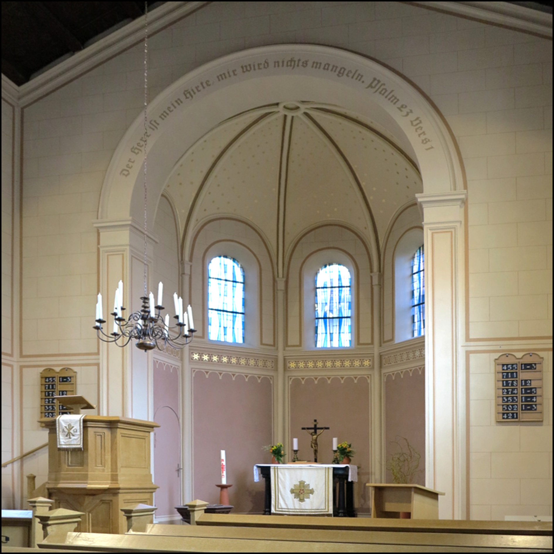 Der Innenraum der Evangelischen Dorfkirche TGlienicke/Nordbahn nach Abschluss der Umgestaltung 2013/2014 (Aufnahme 2015)